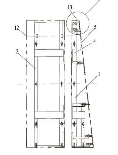 申龙电梯盖板的专利设计